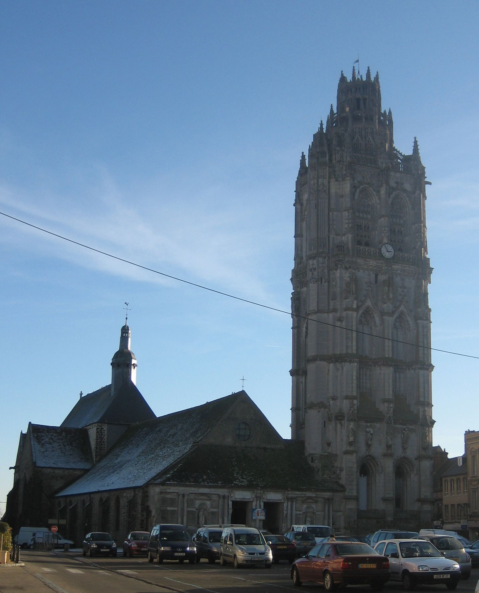 Eglise de la Madeleine - Verneuil-sur-Avre (Eure)